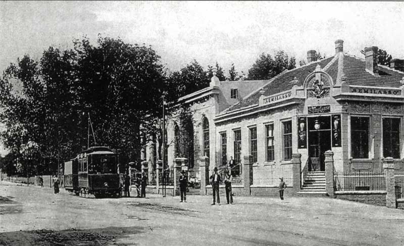 Semilasso v Brně-Králově Poli